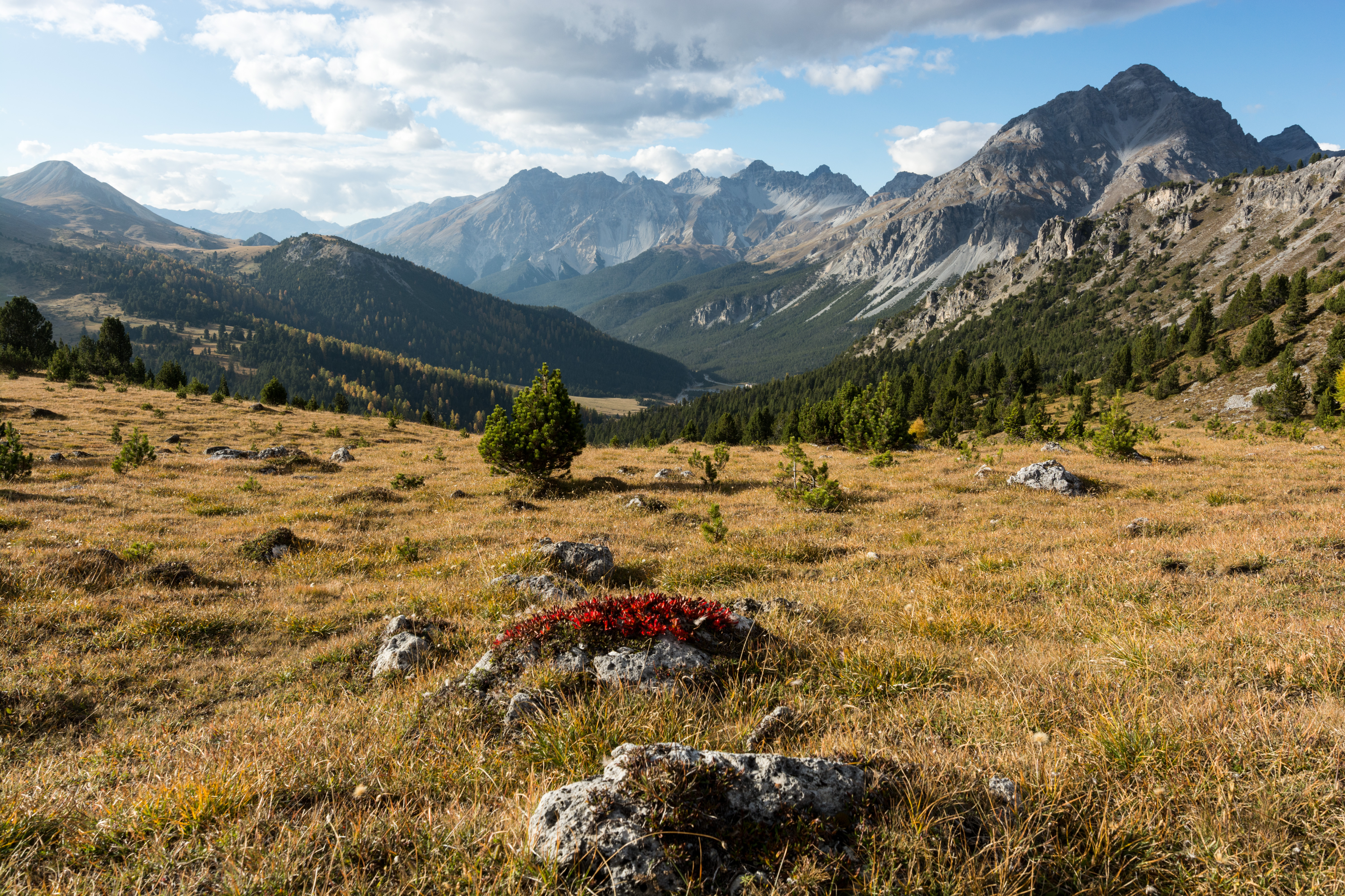 Schweizerischer Nationalpark - Blick im Herbst auf Buffalora, dahinter Piz dal Fuorn und rechts Piz Nair, im Vordergrund Alpen-Bärentraube (Arctostaphylos alpinus)